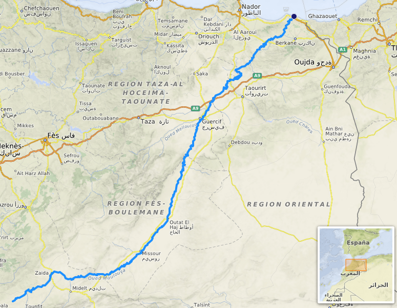 carte réalisée sur umap This map may be incomplete, and may contain errors. Don't rely solely on it for navigation.